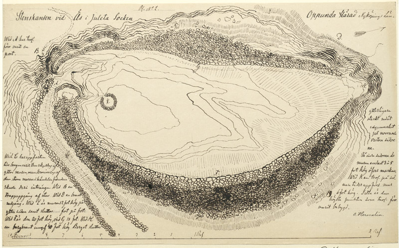 Raä-nr: Julita 12:1. Fornborg vid Äs. Tuschteckning av Olof Hermelin, från 1870-talets mitt. Motiv: Julita 12:1 Kategori: Teckning, Fornborg Raä-nr: Julita 12:1. Fornborg vid Äs. Tuschteckning av Olof Hermelin, från 1870-talets mitt. Julita 12:1.